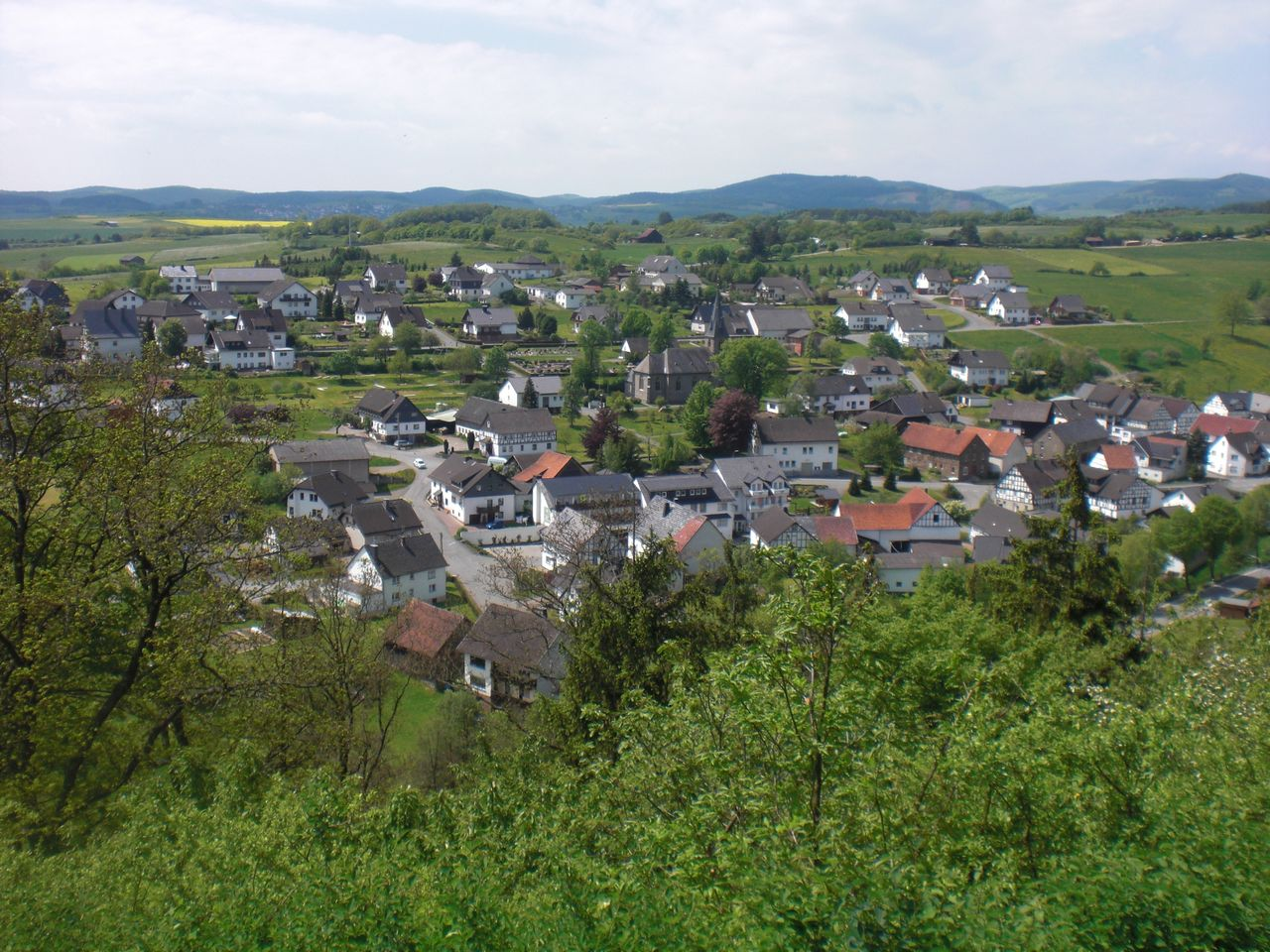 Ansicht des Hallenberger Stadtteils Braunshausen.Im Hintergrund auf der linken Bildhälfte der bis um 600 m erreichende Elbrighäuser Wald mit Bromskirchen am Nordosthang und rechts dahinter den Kuppen nördlich (590 m) und nordwestlich (592 m) von Neuludwigsdorf; rechts davon Nordostausläufer der Wilden Struth mit der Oberecke (649,3 m) unmittelbar südlich von Dachsloch und oberhalb der Elsoff sowie, hervorgehobener, Großem (668,0 m) und Kleinem (669.1 m) Hohen Stein (rechts der Mitte); rechts davon Südausläufer der Ziegenhelle mit dem Heidkopf (704,1 m, ganz rechts).Vgl. Udeuschle